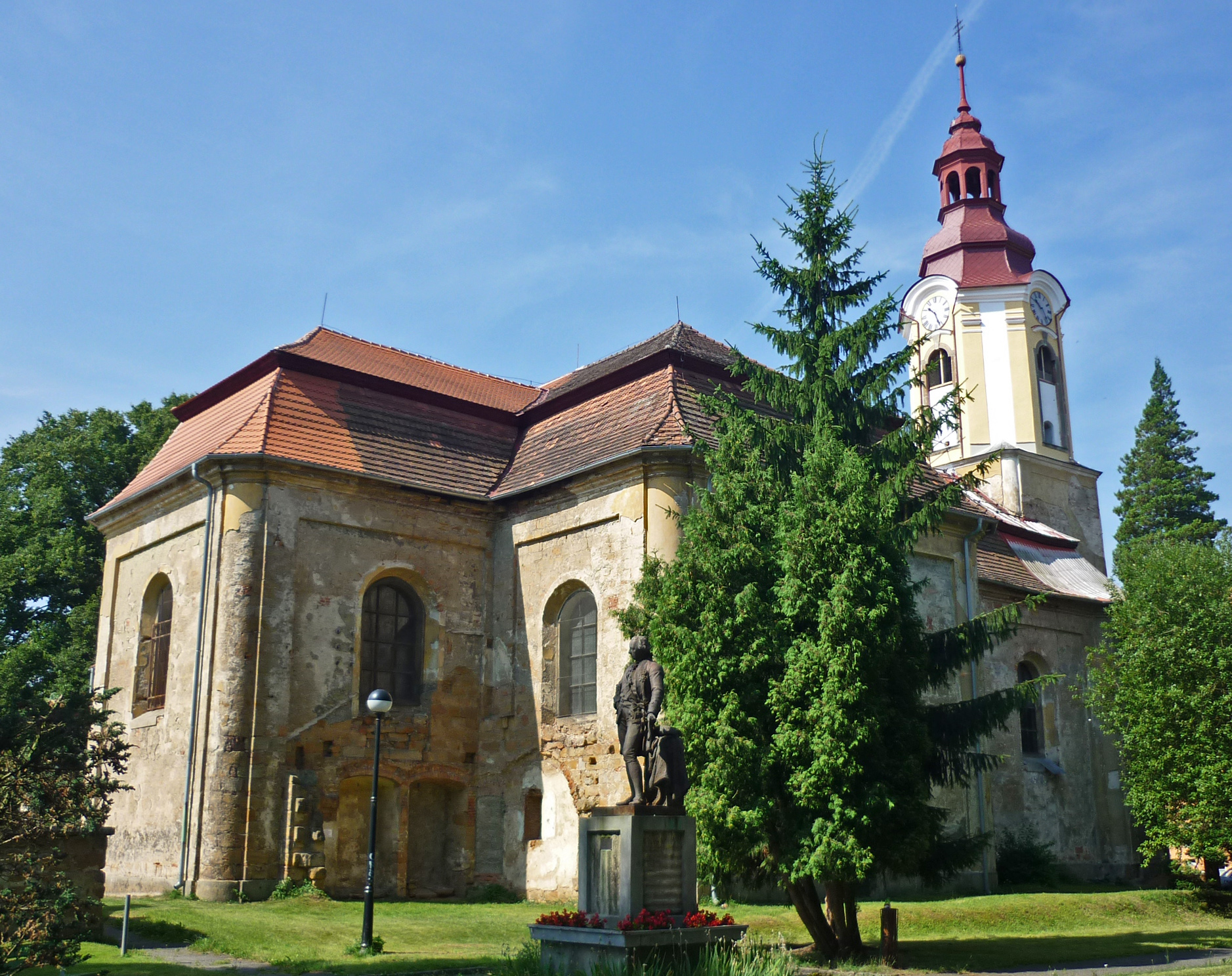 Sigismund-Kirche in Wartenberg am Roll (Stráž pod Ralskem)